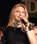 ELIANE ELIAS GRAND REX, PARIS FESTIVAL JVC, PARIS 19 /10/2004